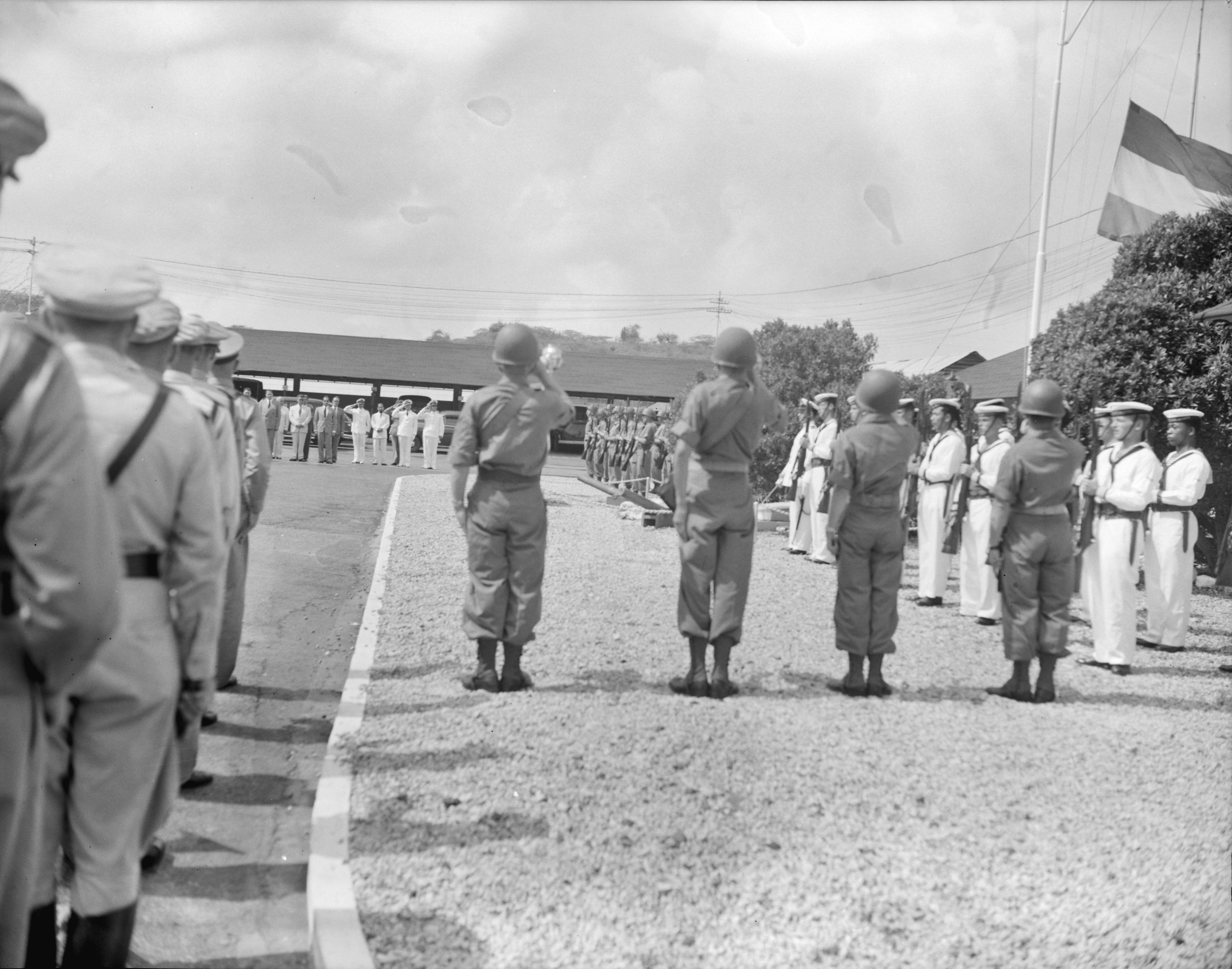 Collectie / Archief : Fotocollectie Anefo Reportage / Serie : [ onbekend ] Beschrijving : Dodenherdenking op Marinebasis Parera te Willemstad op Curacao. Gouverneur Mr. A. A. M. Struycken legt krans Datum : 8 mei 1953 Locatie : Curacao, Nederlandse Antillen, Willemstad Trefwoorden : dodenherdenkingen, marine Persoonsnaam : Gouverneur Mr. A. A. M. Struycken Fotograaf : Weesing, […] / Anefo Auteursrechthebbende : Nationaal Archief Materiaalsoort : Negatief (zwart/wit) Nummer archiefinventaris : bekijk toegang 2.24.01.04 Bestanddeelnummer : 905-7103